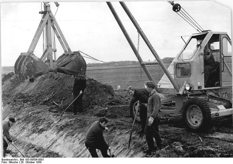 Anlegen eines Entwässerungsgrabens Zentralbild Nitsche 28.10.1958 Erschließung des Rhin-Havel-Luchs geht weiter. Der Grabenneubau für die Entwässerung des Rhin-Havel-Luchs, Objekt Nauen kann seit dem 20.10.58 von den freiwilligen Jugendbrigaden in beschleunigtem Tempo durchgeführt werden. Ein für Erdarbeiten eingerichteter Dunglader übernimmt dabei einen Teil der schweren körperlichen Arbeit. Die Brigaden der anderen Bau objekte werden ebenfalls mit umgebauten Dungladern ausgerüstet. UBz: Eine Jugendbrigade beim Grabenziehen im Objekt Nauen. Die Tagesleistung dieser Brigade beträgt 50 m Graben.